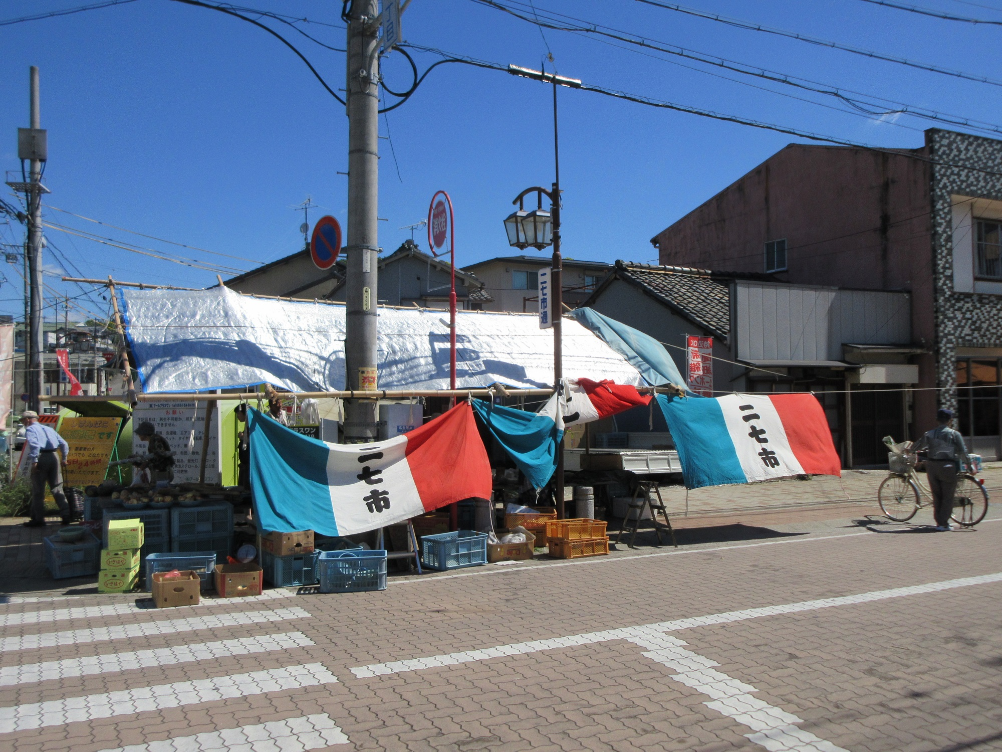 岡崎市八幡町